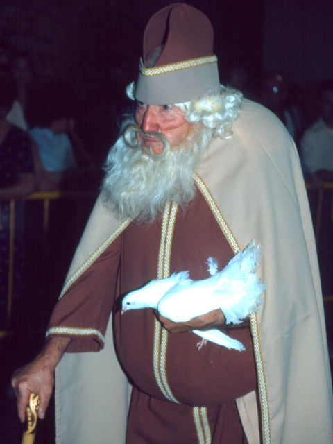 L'AGUELET COLOMET - NOÉ A LA PROCESSO DE LA MARE DE DEU DE LA SALUT D'ALGEMESÍ.